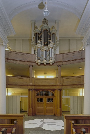 Rooms-Katholieke Kerk Aan 't Zand: Interieur, overzicht westgevel met orgel, orgelnummer 49 (opmerking: Gefotografeerd voor Het Historische Orgel in Nederland 1819-1840, bladzijde 36)